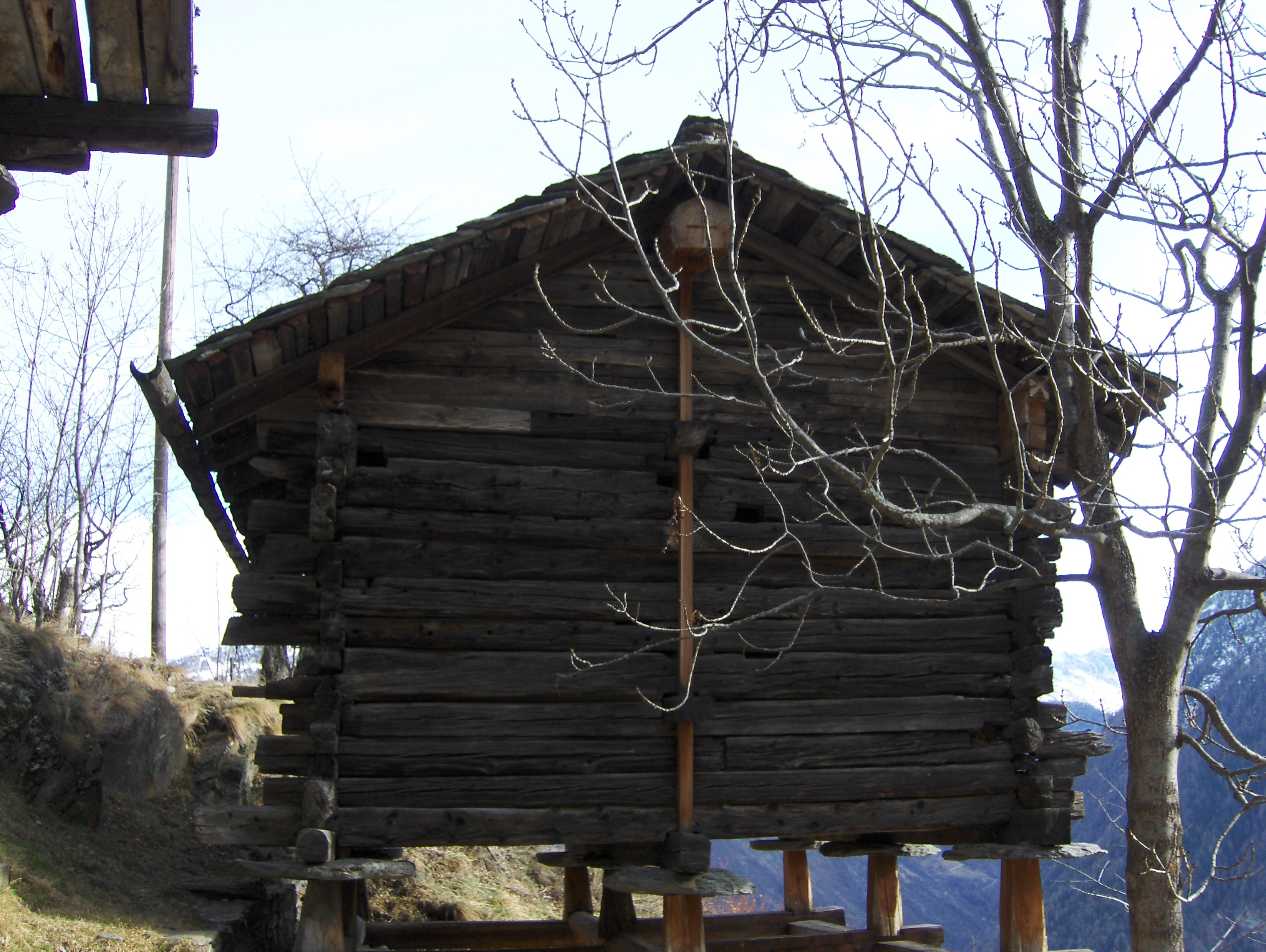 Alter Walliser Stadel in Törbel